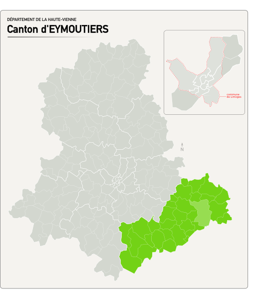 Carte du nouveau canton d'Eymoutiers.